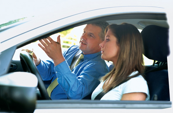 Eco-Drive Fahrschule